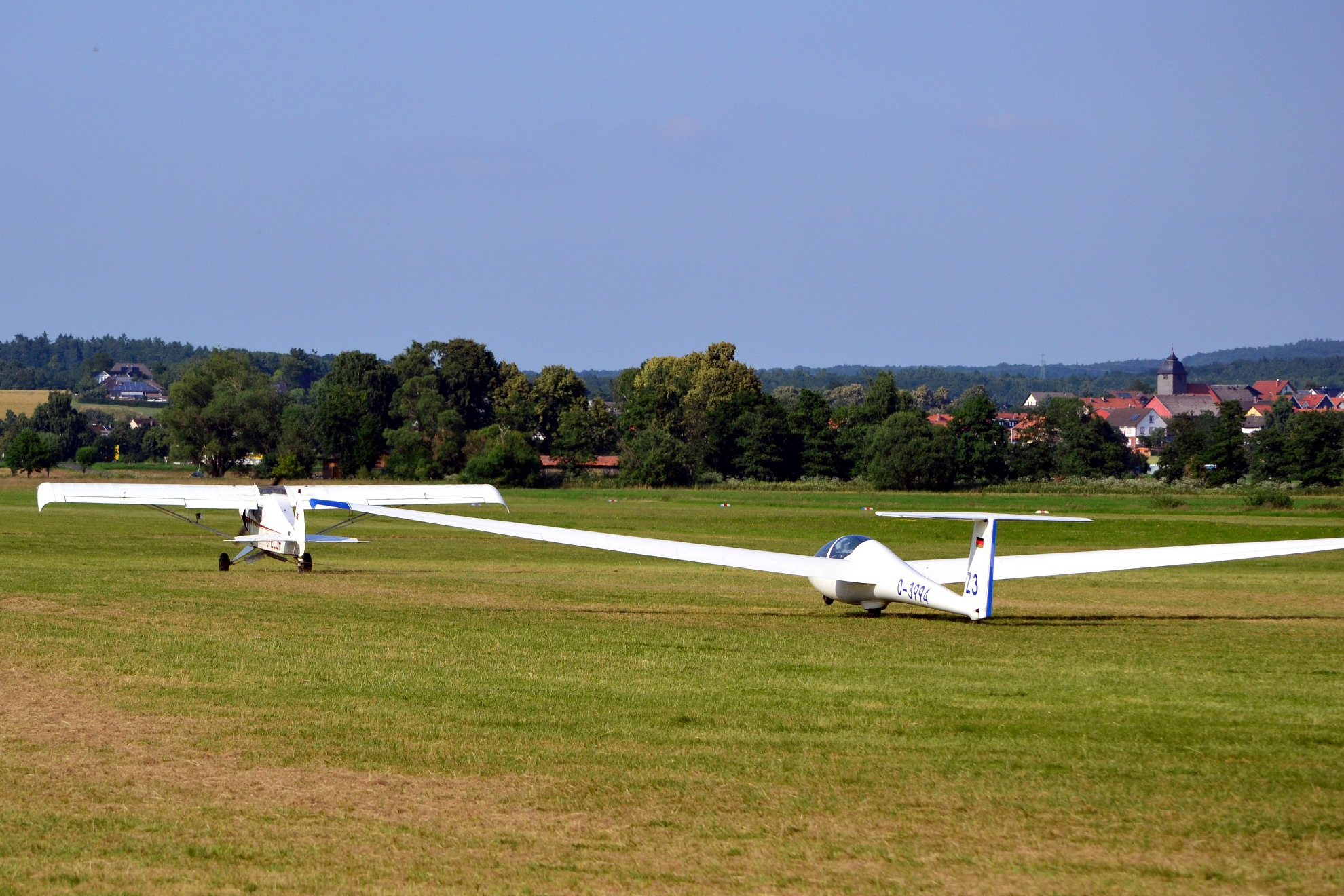 Segelfluggelände „Der Ring“ in Ziegenhain, Schwalmstadt Flugzeugschlepp.